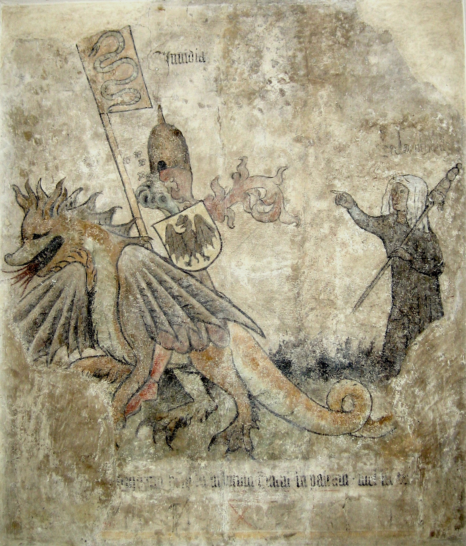 Fresko aus der Kantonsschule Küsnacht ZH, 1. Stock: Kampf der Tugenden gegen das Laster. Der Neid reitet auf einem flammenspeienden Drachen, auf dem Helm ein Bienenkorb, im Schild eine Fledermaus, im Banner eine Schlange (Nach J.R. Rahn, Geschichte der bildenden Künste in der Schweiz, Zürich 1876, S. 649 f)